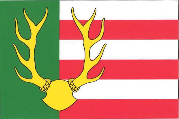 vlajka, Železná Ruda, okres Klatovy